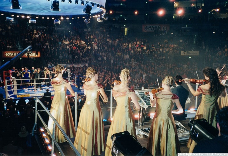 Robert Bartha an der gläsernen Orgel beim Box WM Kampf Klitschko vs. Byrd, Live auf Sat.1